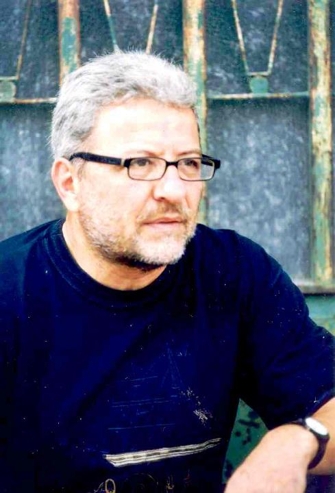 Έλληνας ποιητής, λογοτέχνης και εκδότης